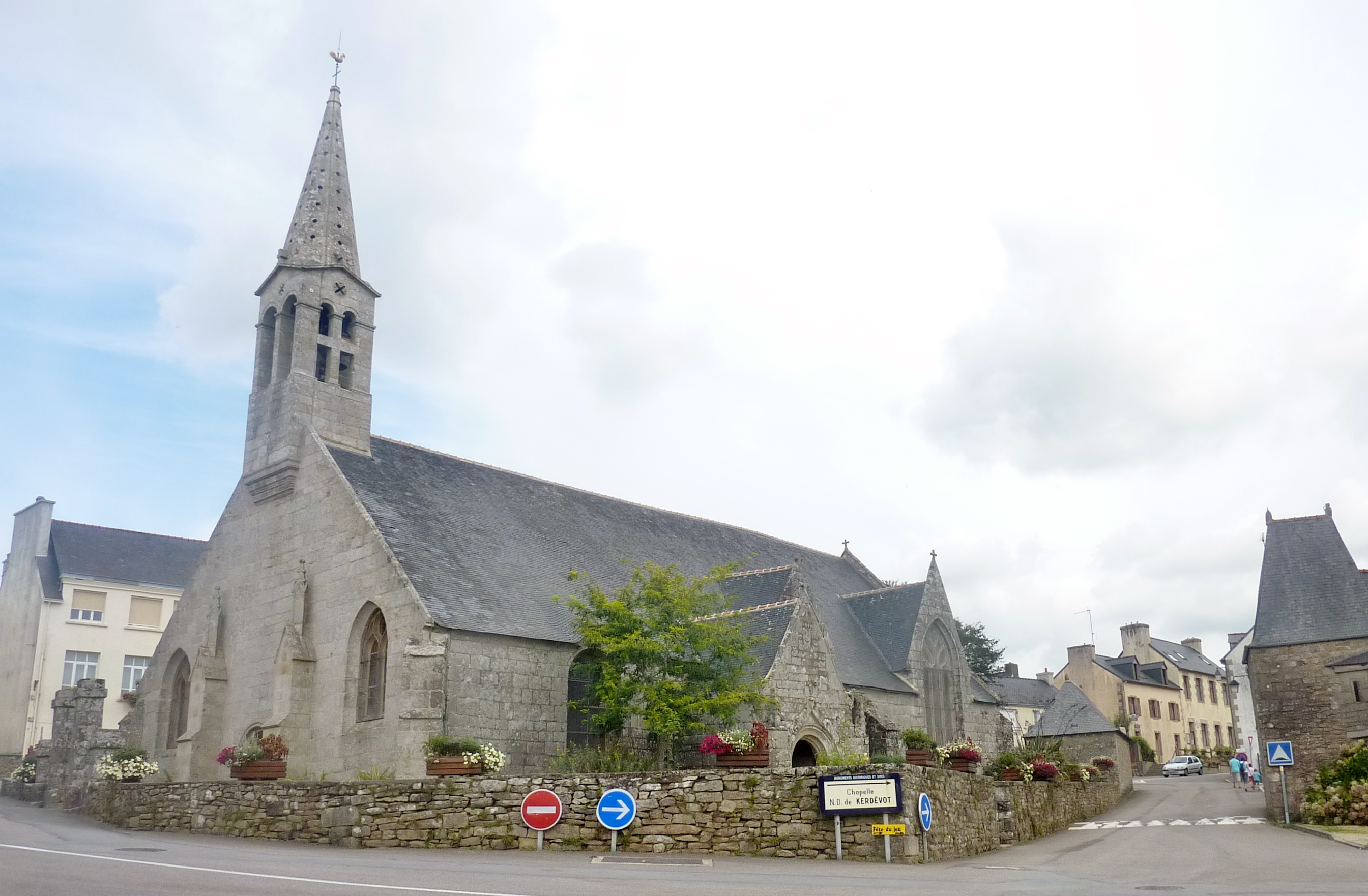 Ergué-Gabéric : l'église paroissiale Saint-Guinal (début XVIème siècle)